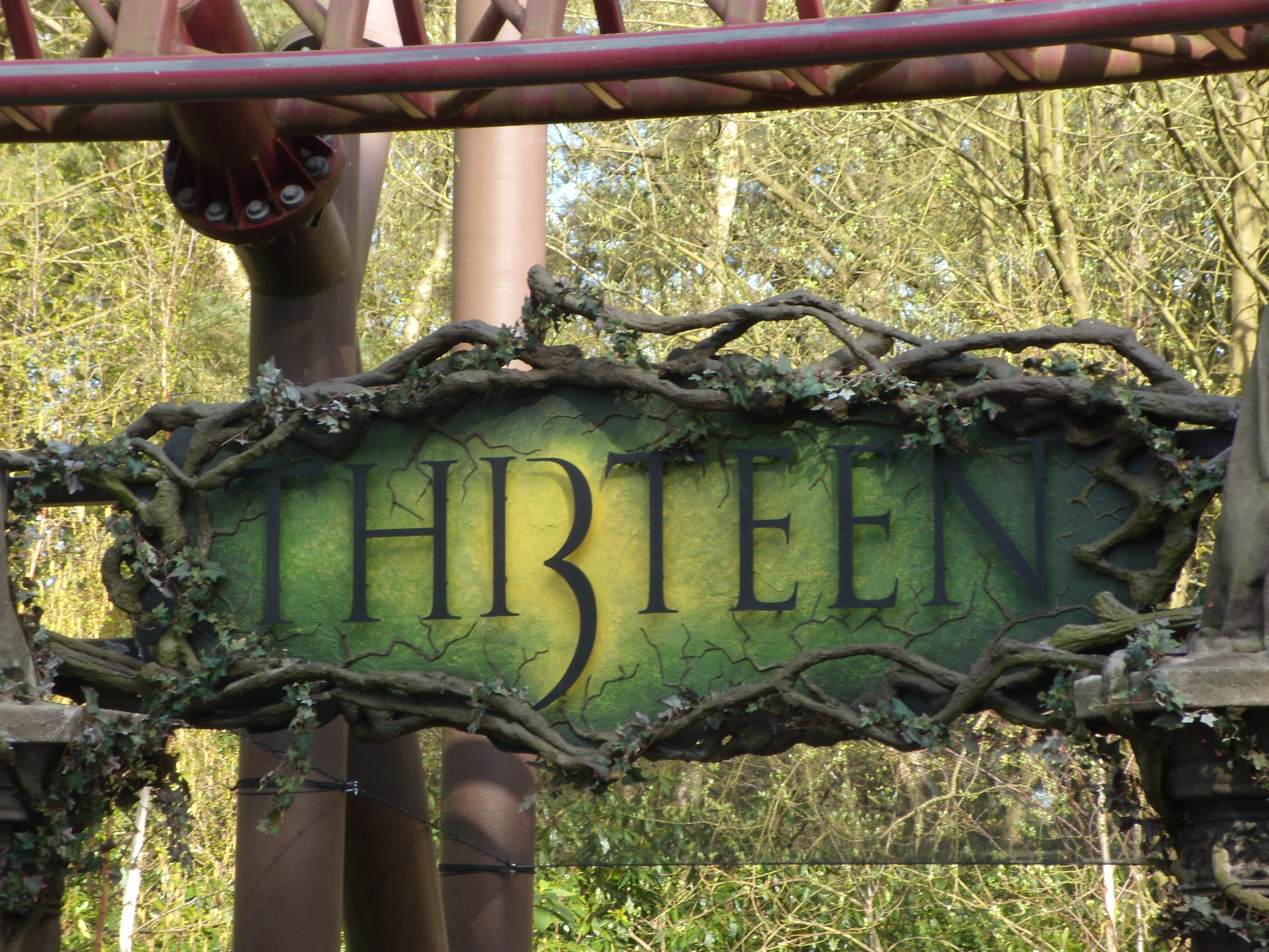 Enseigne de l'attraction Thirteen à Alton Towers, Angleterre